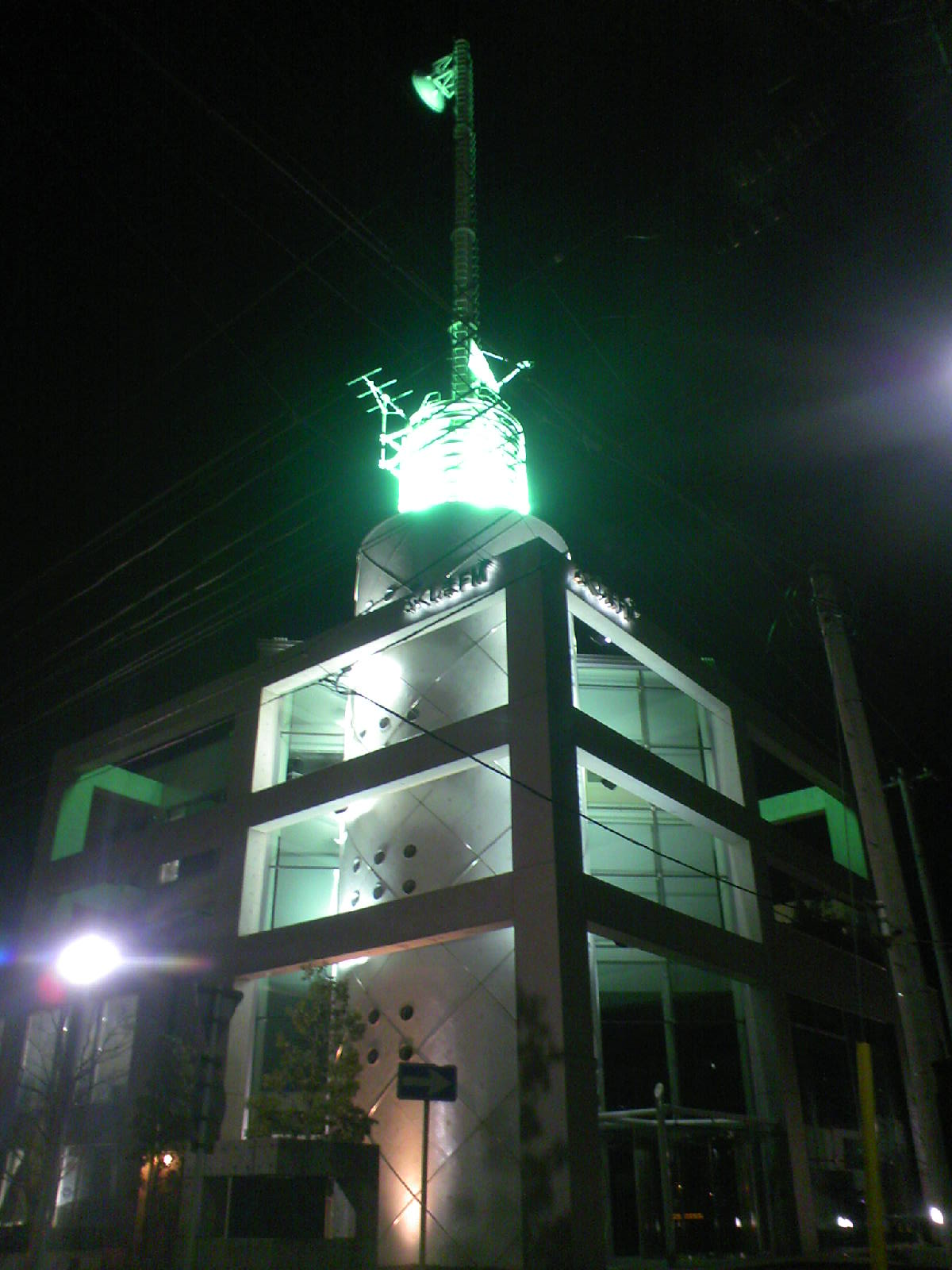 FM Fukushima Co,. Ltd. ふくしまFM郡山本社